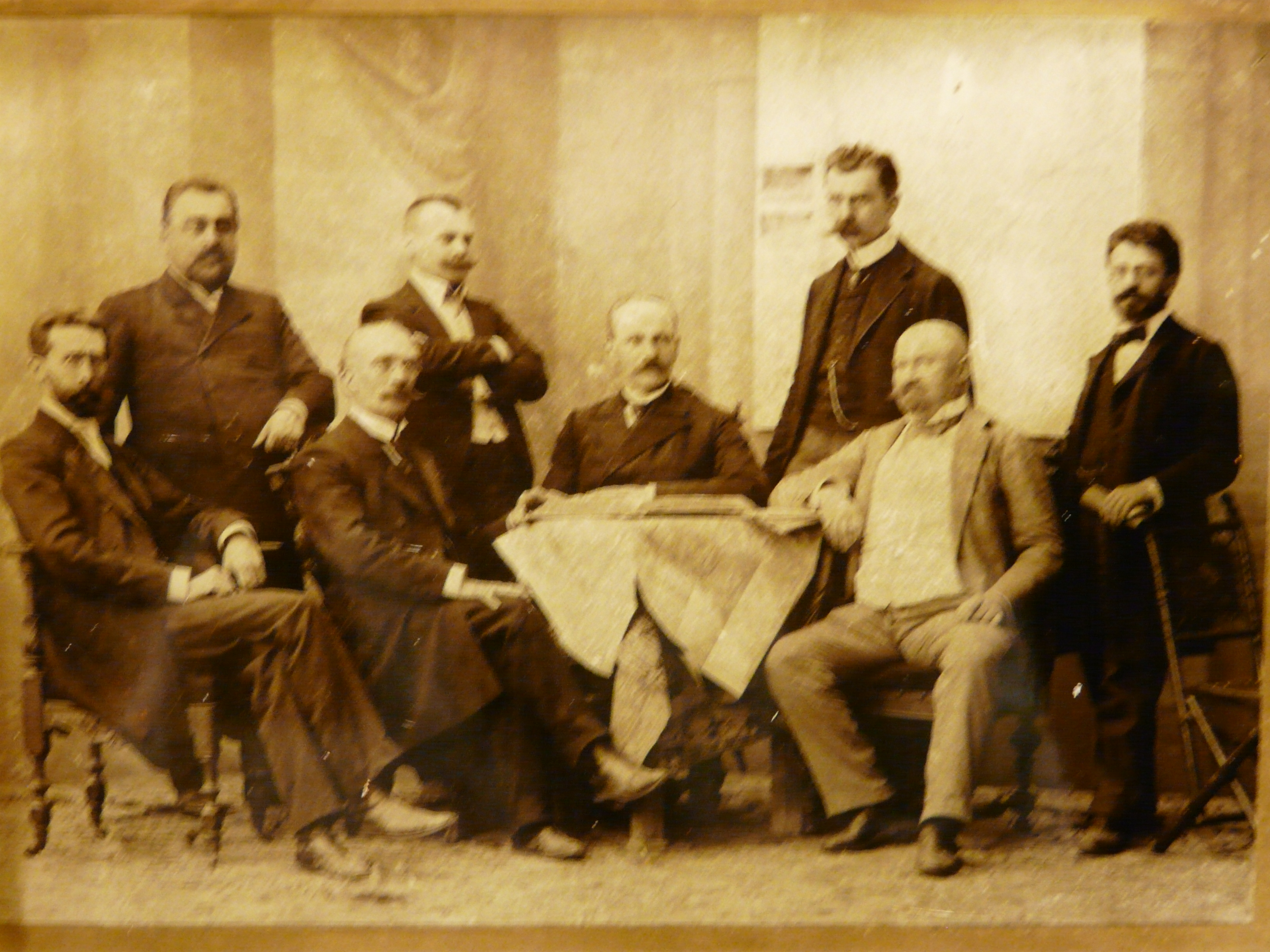 Zakopane. Zespół dworsko-parkowy w Kuźnicach, okolice i wnętrza. Polscy uczestnicy procesu w Graz w dniu ogłoszenia wyroku (13-09-1902)